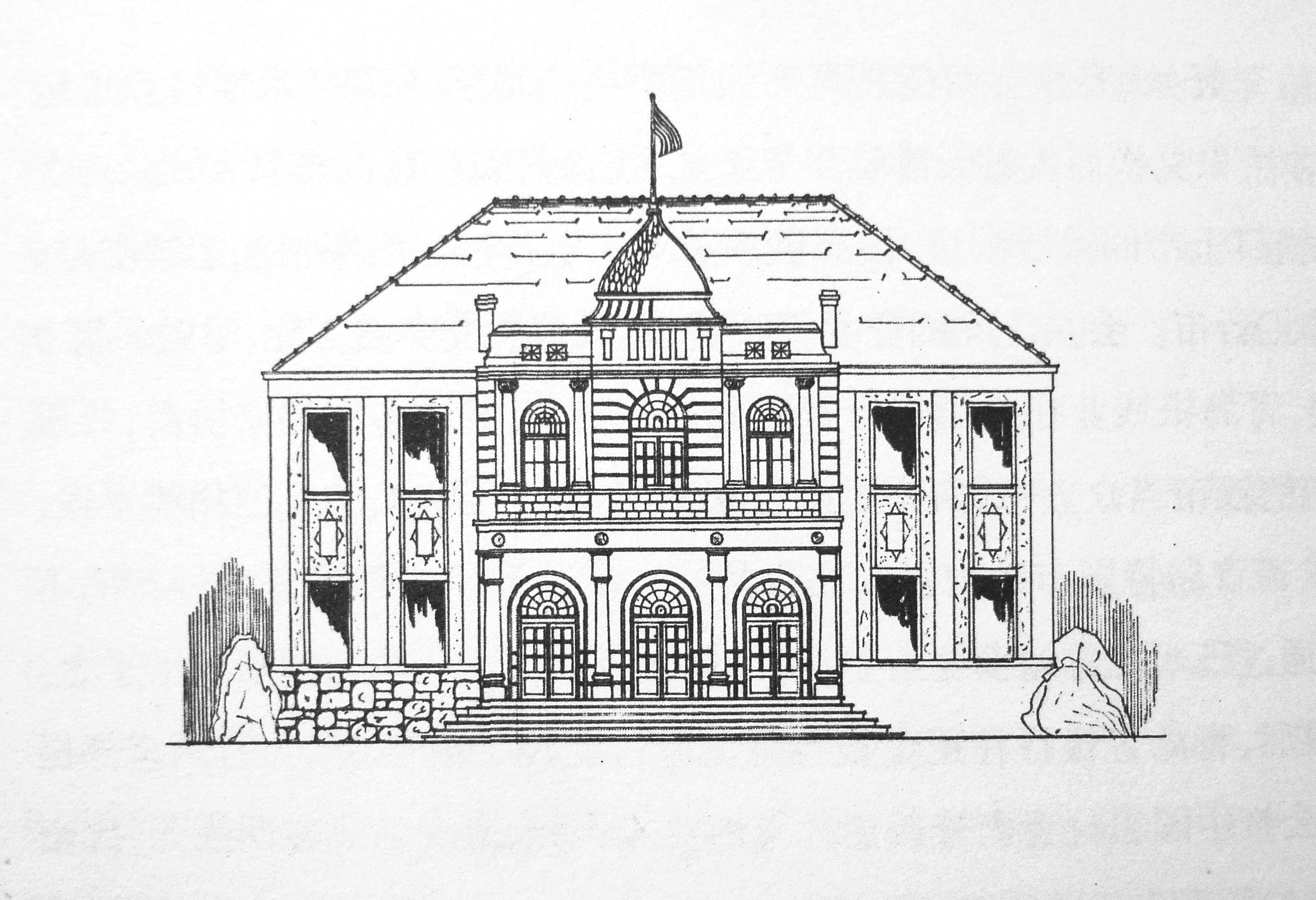 青岛齐燕会馆正立面设计图